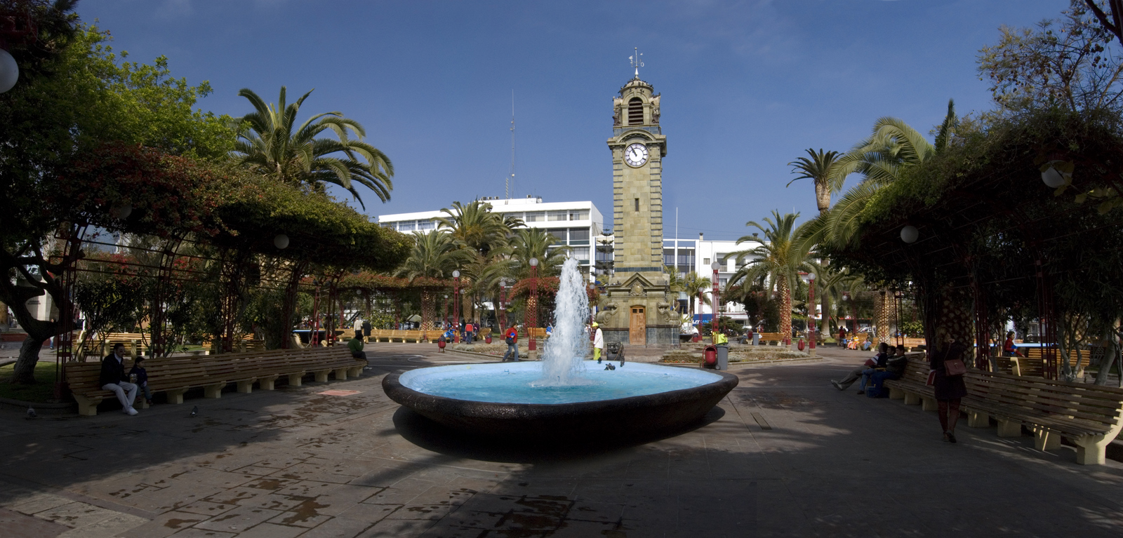 Torre reloj en el centro de la plaza Colón, Antofagasta.